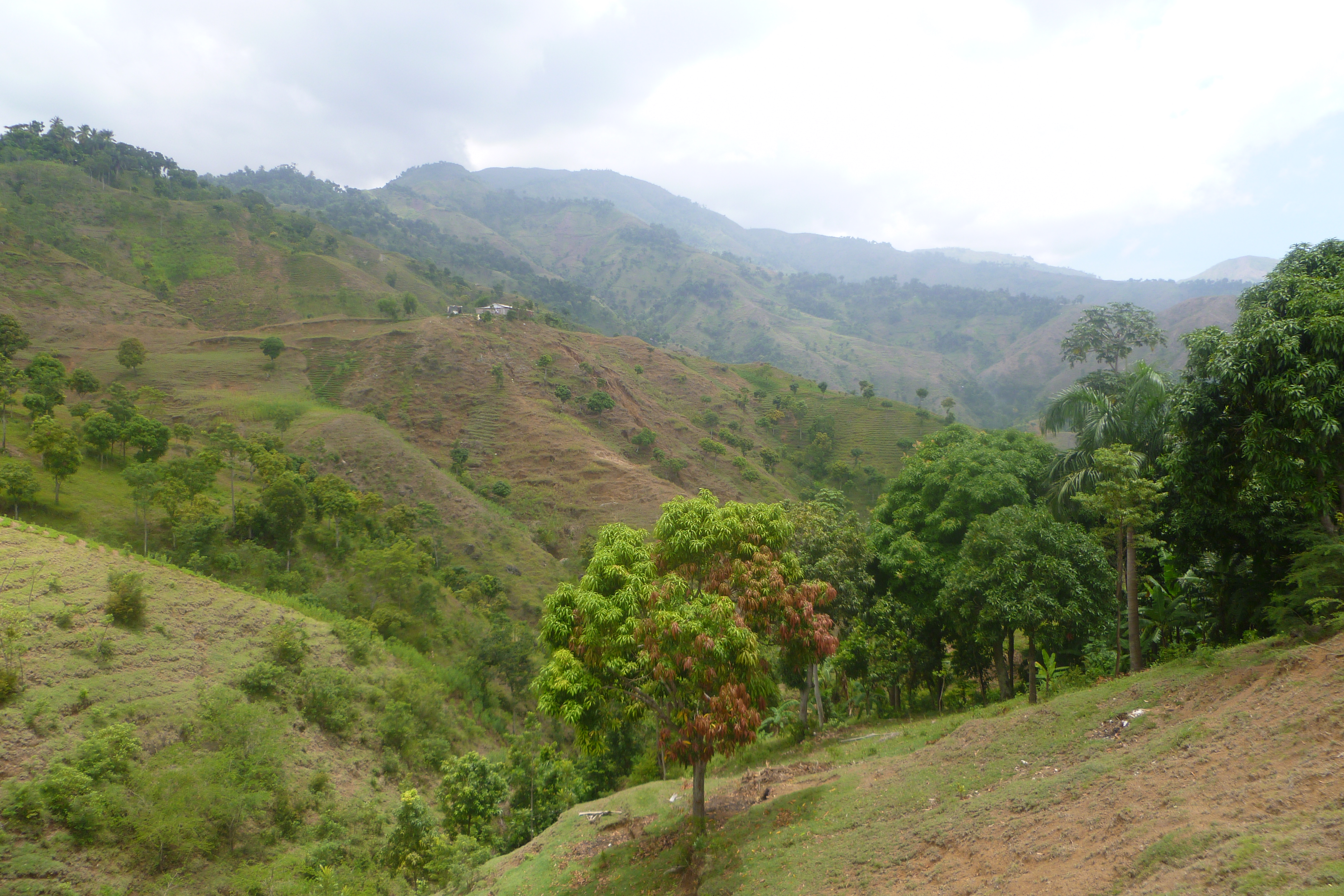 Chevrine, Orangers, Léogâne